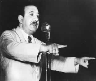 Moises Lebensohn microfono